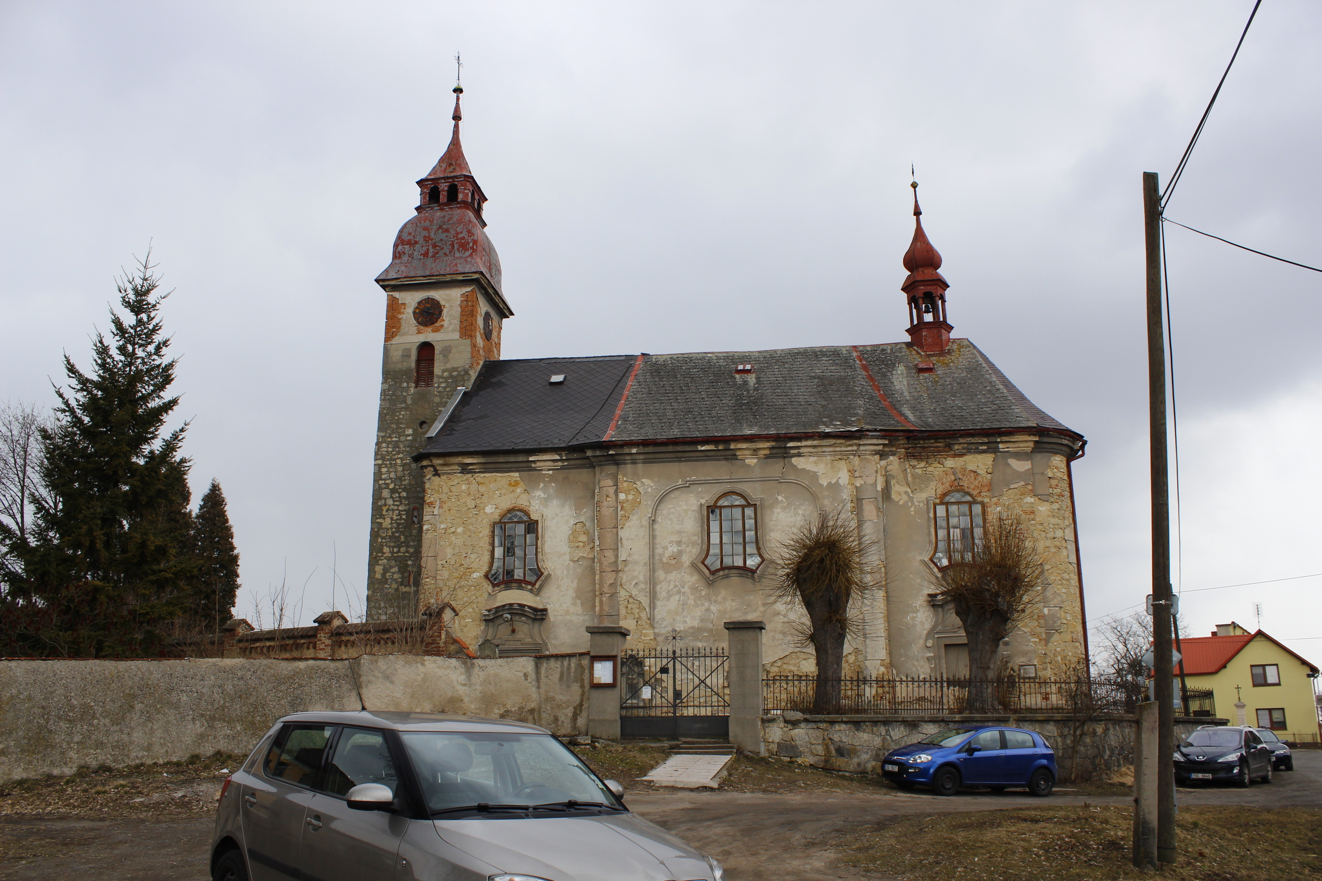 Kostel svatého Františka Serafinského v Kováni.